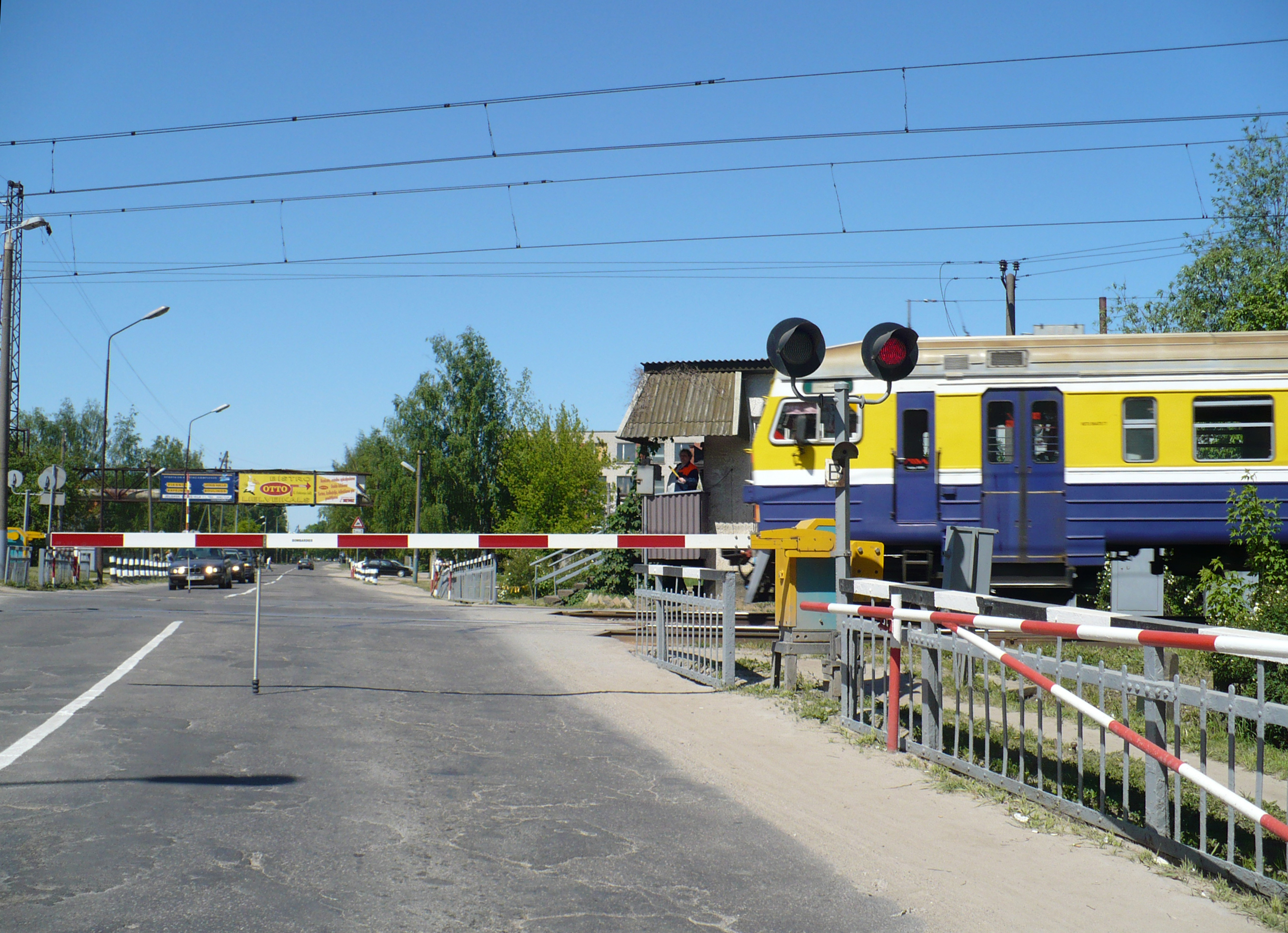 Dzelzceļa pārbrauktuve Jelgavā, Garozas ielā (P93)